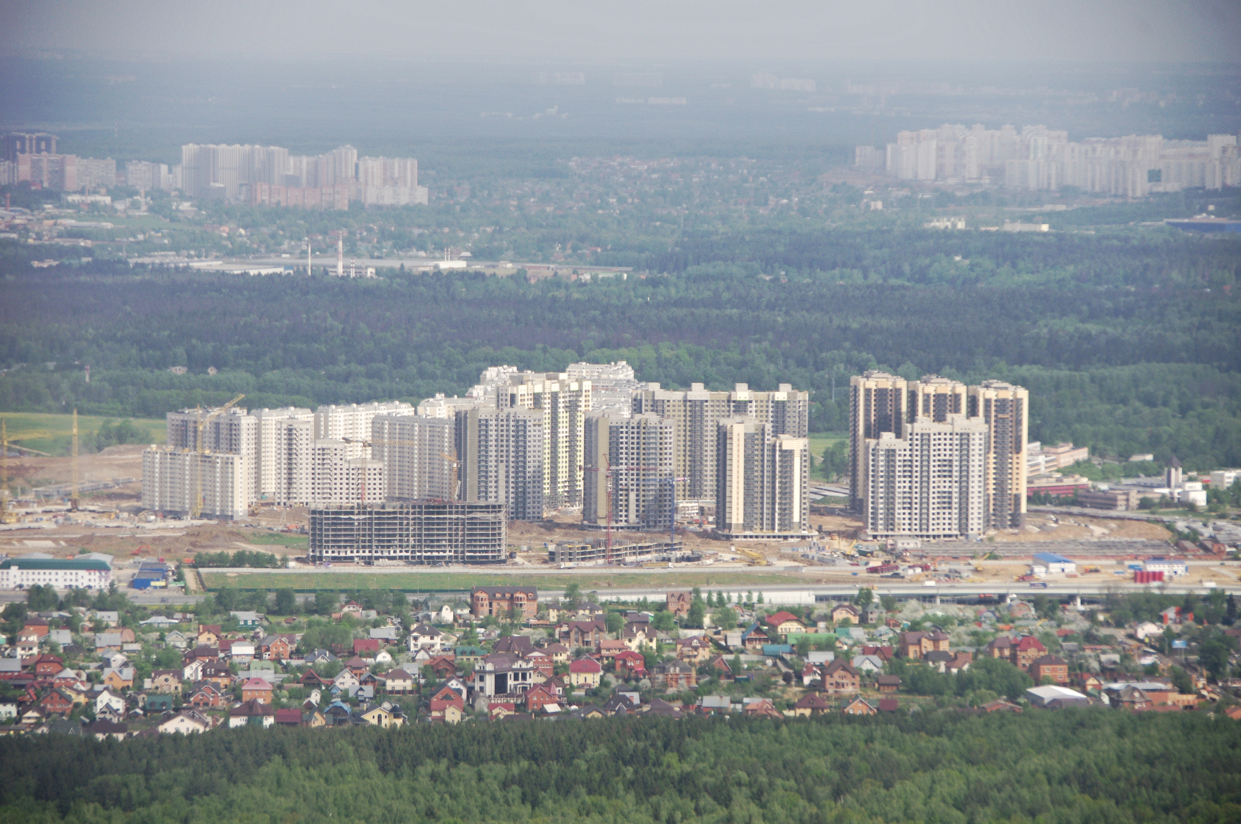 Вид из самолёта ATR-72 по маршруту Внуково - Стригино.